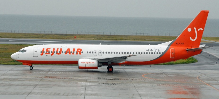 済州航空の航空機。北九州空港にて撮影。